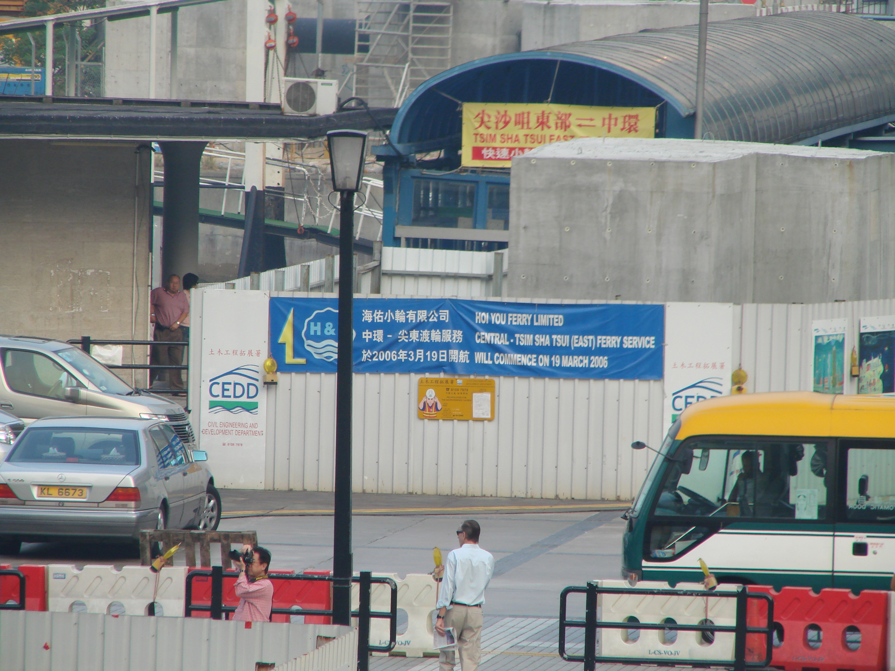 中文（香港）: 大會堂碼頭。